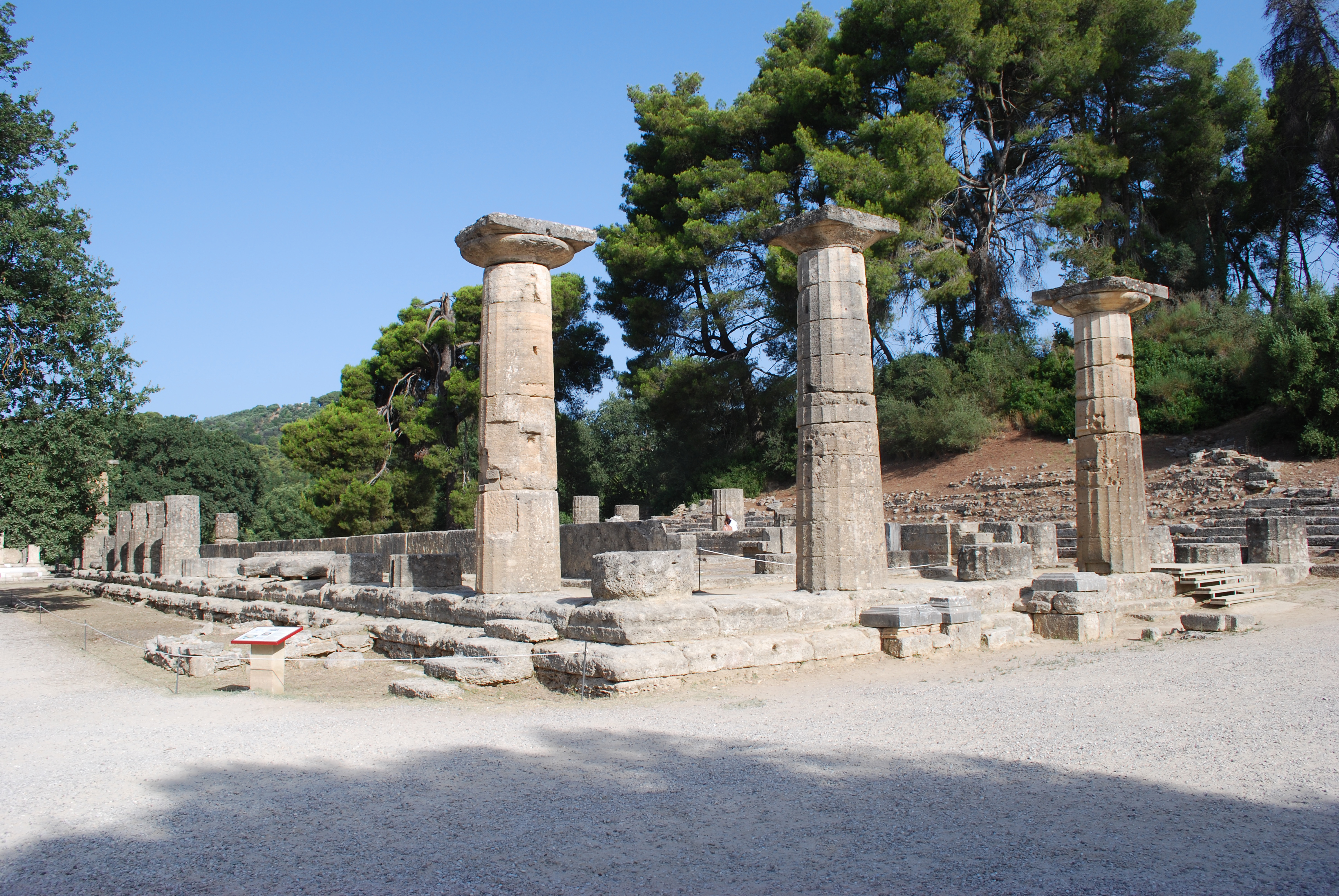 Olympie : temple d'Héra, façade Est.